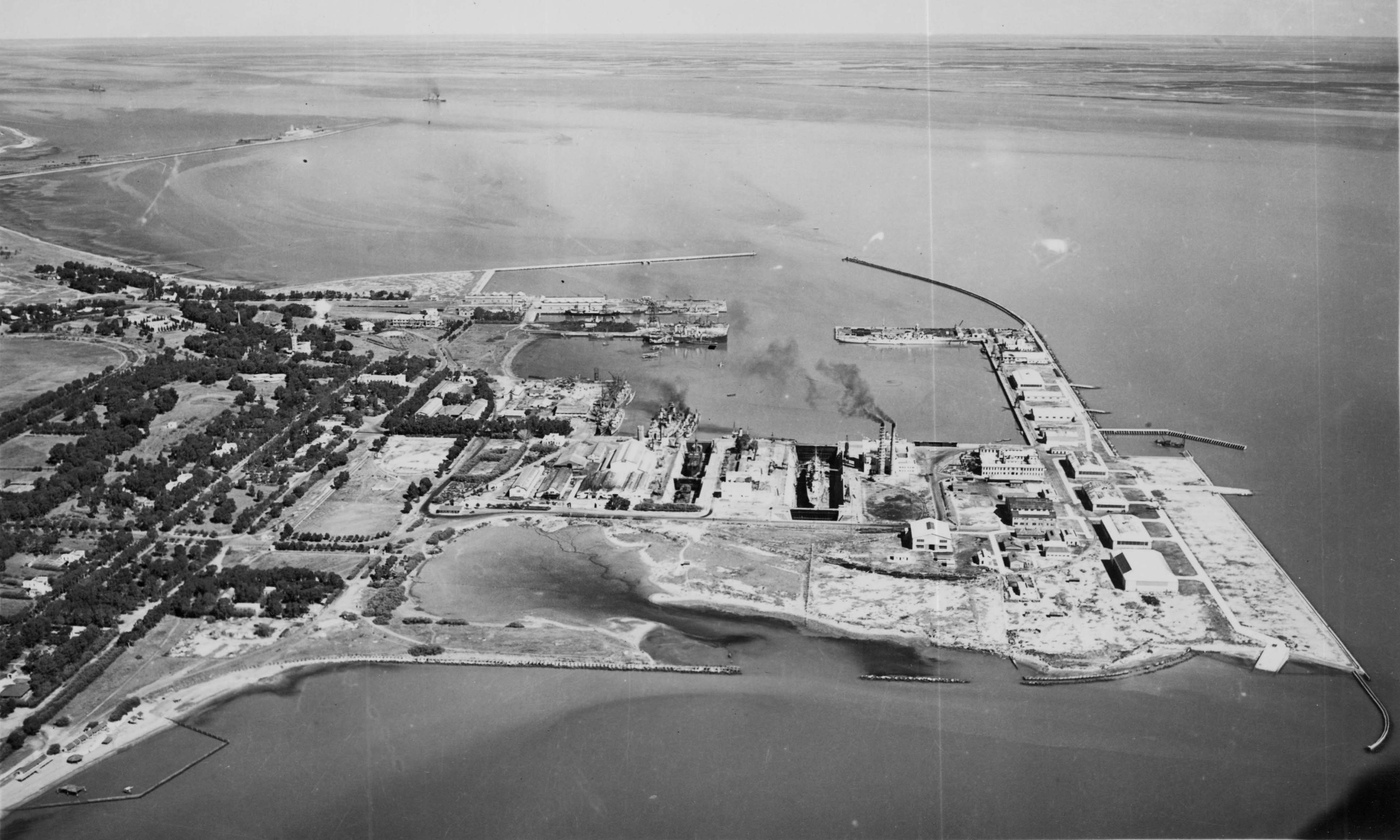 Vista general de la Base Naval de Puerto Belgrano en 1943